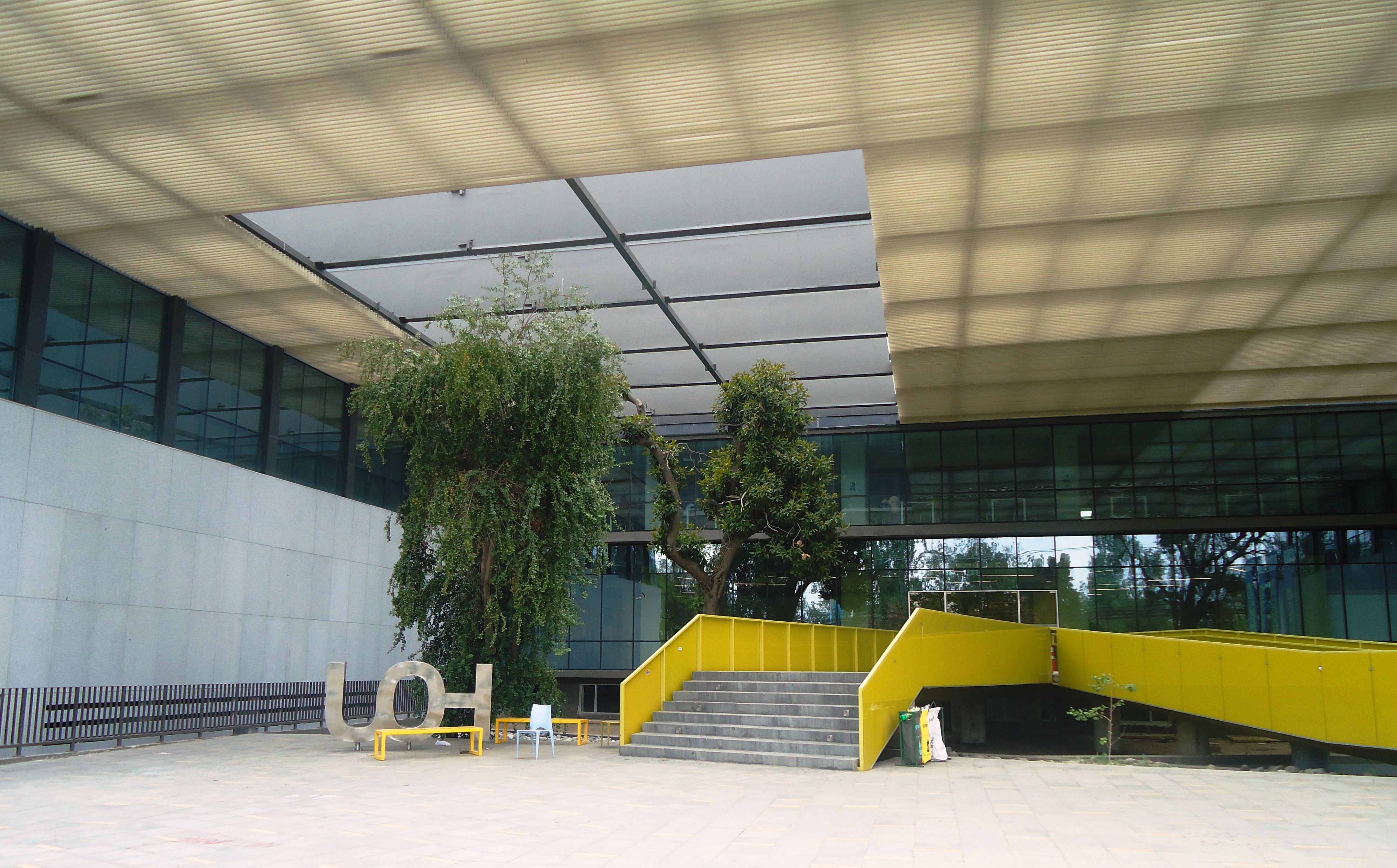 Vista del frontis del Campus Rancagua de la Universidad de O'Higgins